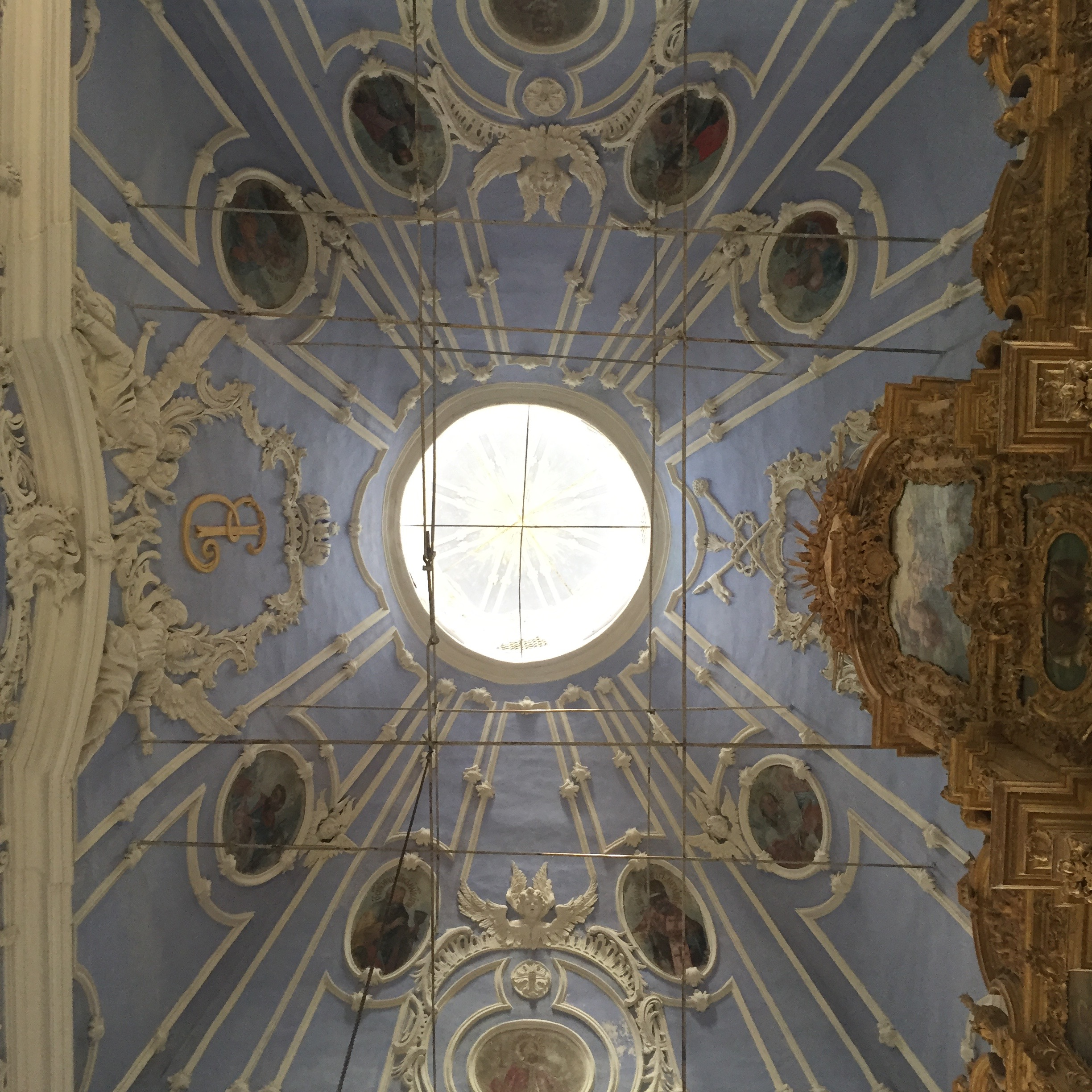 Купол Успенского собора